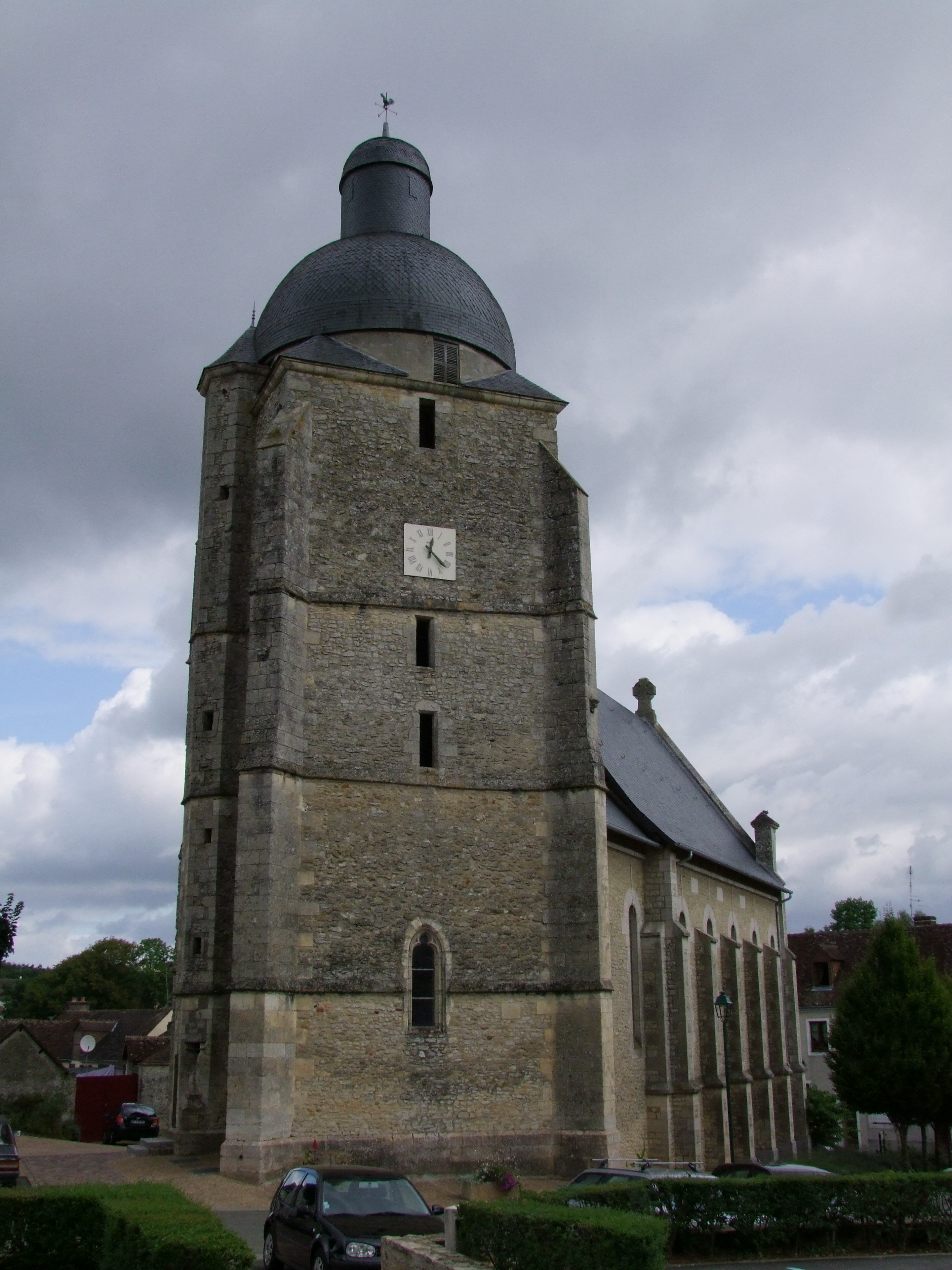 Clocher de l'Église Saint-Pierre-et-Saint-Paul (Inscrit) .